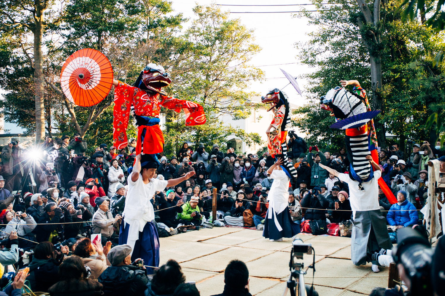 増田神社での総舞の様子。